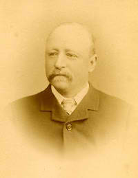 Richard Henry Brunton (1841-1901), ingénieur britannique.